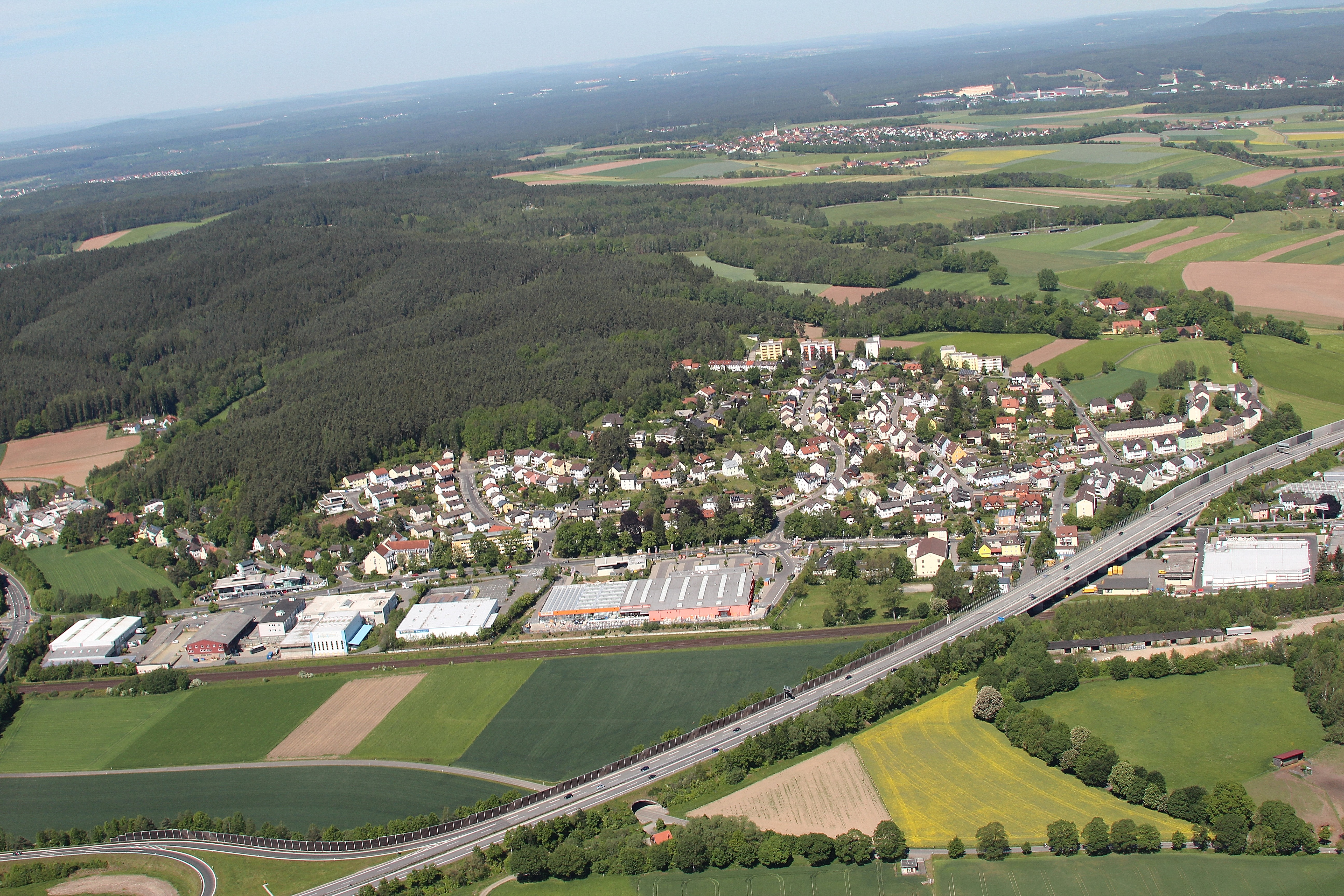 Weiden in der Oberpfalz, Bayern; Konradshöhe, Bundesautobahn A 93, im Hintergrund Neunkirchen